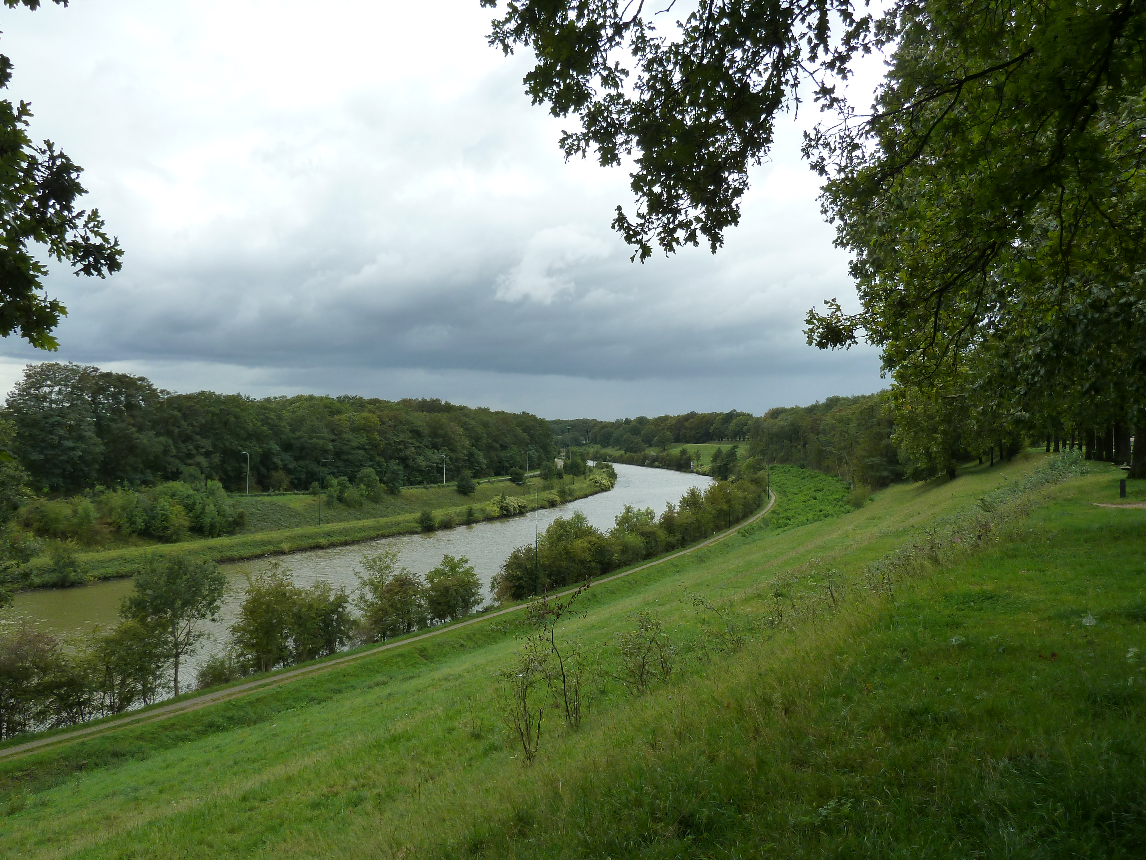 Vanaf de Scharberg uitzicht op het kanaal, Elsloo, Limburg, Nederland